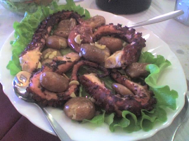 Portuguese cuisine - Polvo à Lagareiro (Alcochete)